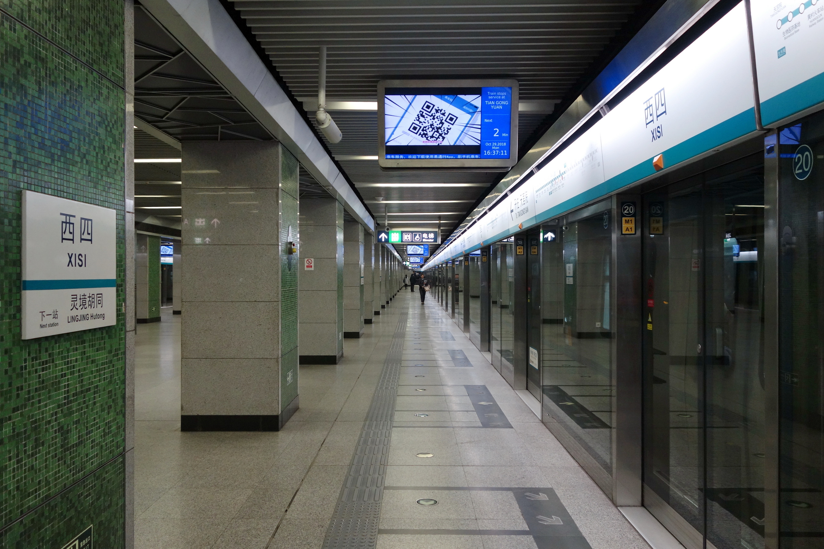 北京地铁4号线西四站下行站台